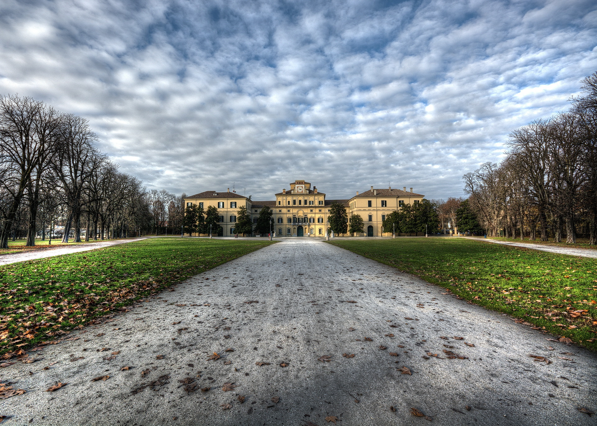 Palazzo Ducale This is a photo of a monument which is part of cultural heritage of Italy.